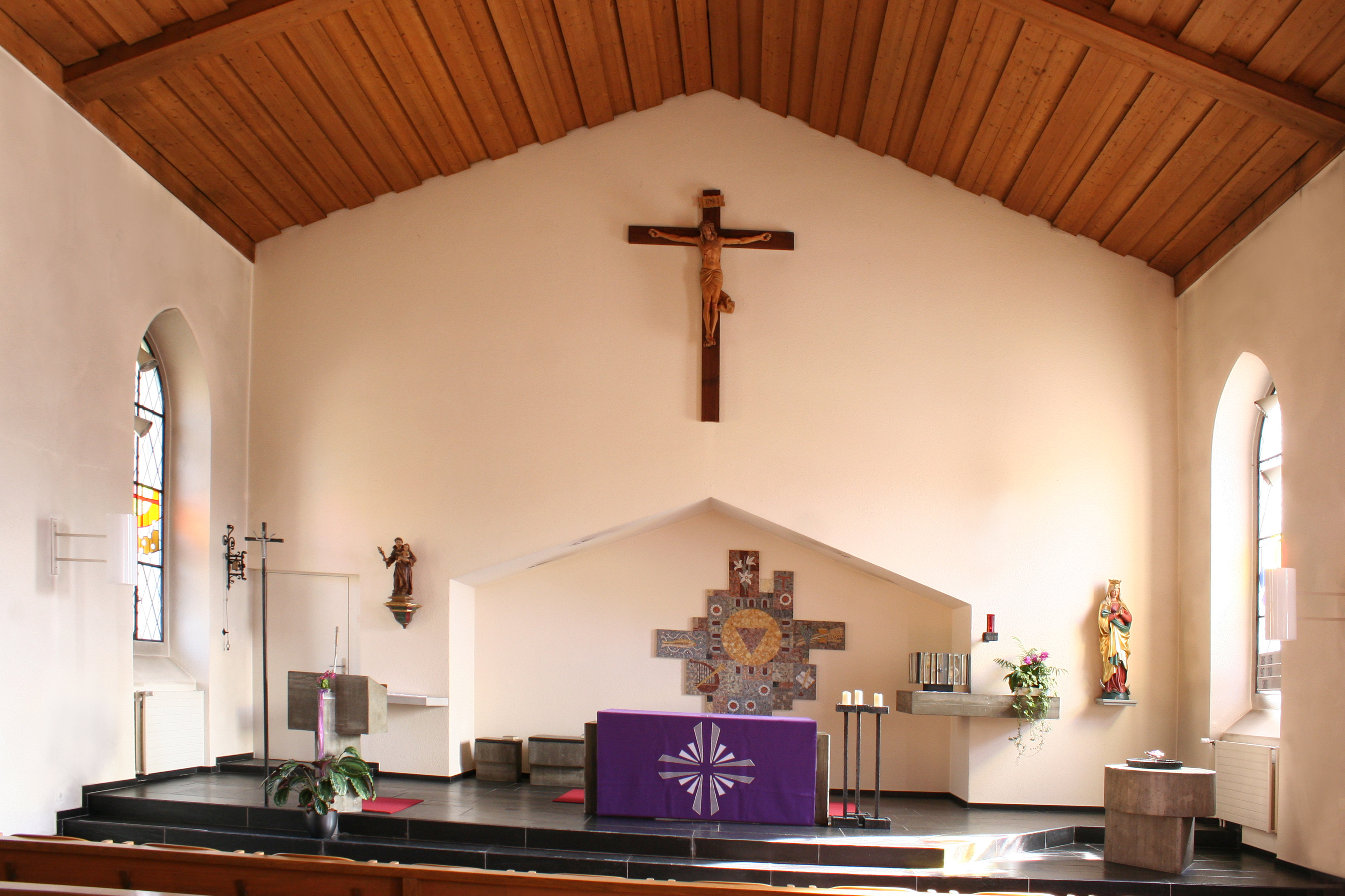 Römisch-katholische Pfarrkirche St. Antonius Kollbrunn, Ansicht von Nordwesten